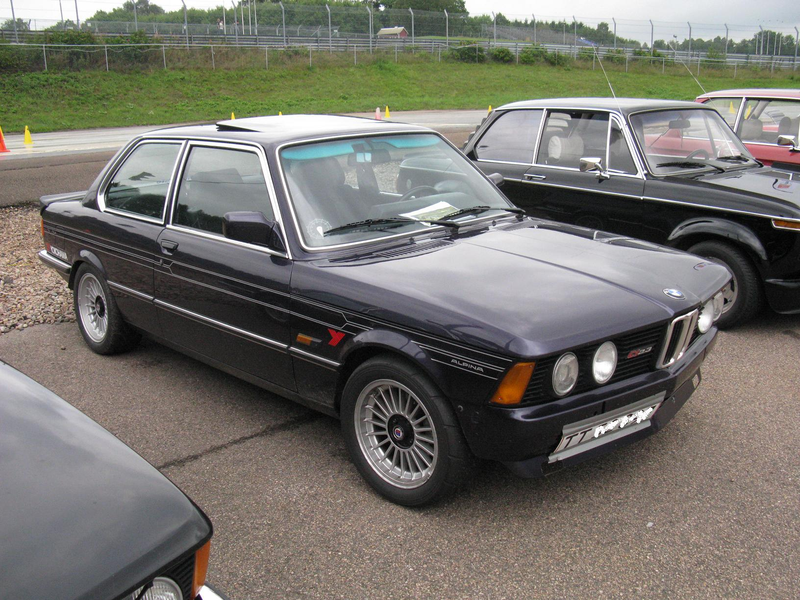 BMW Alpina C1 2.3